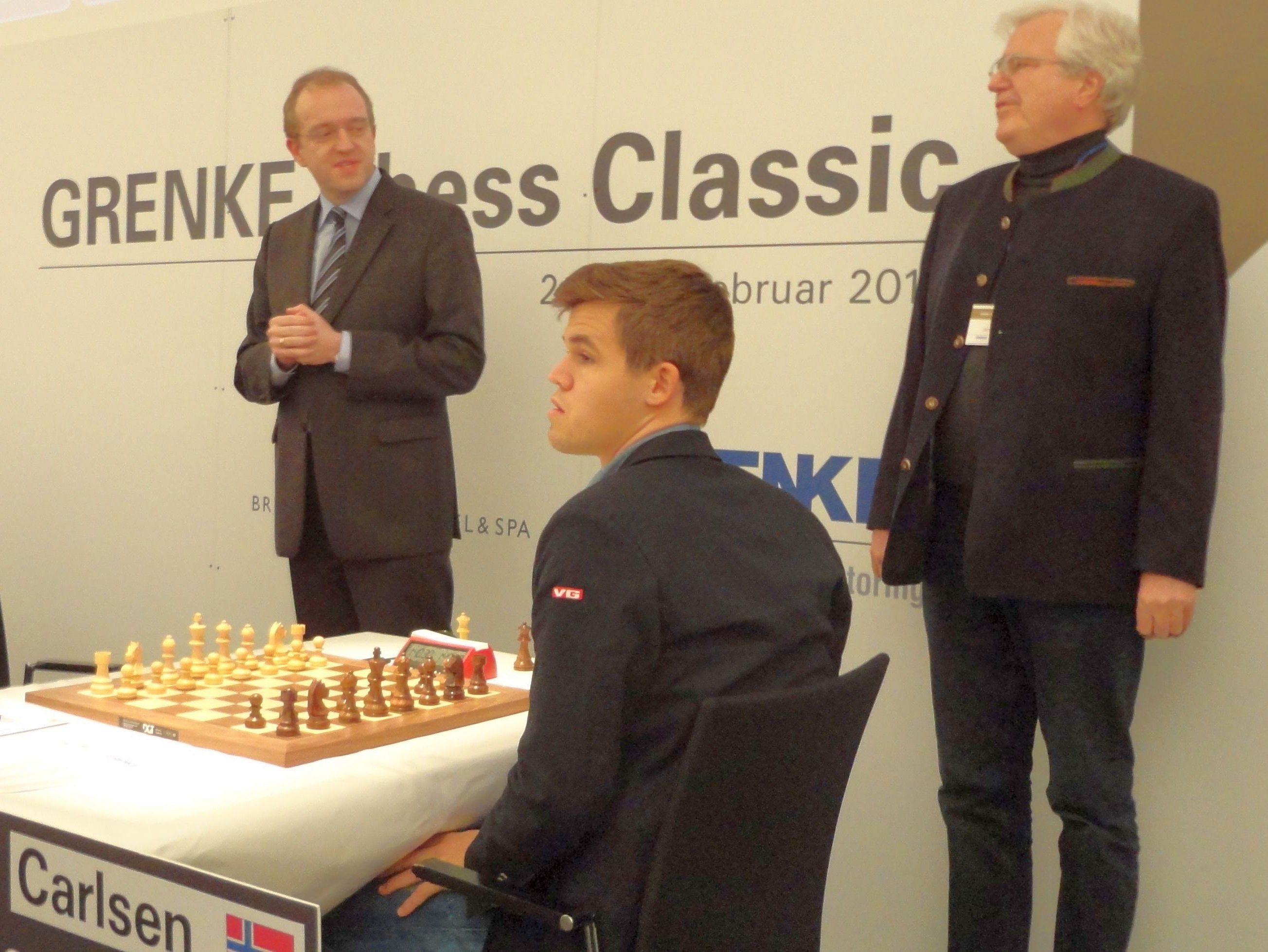 Sven Noppes, Magnus Carlsen und Jens Thieleke vor Start der dritten Runde des GRENKE Chess Classic Baden-Baden 2015. Der gesamte Saal wartet auf Arkadij Naiditsch.